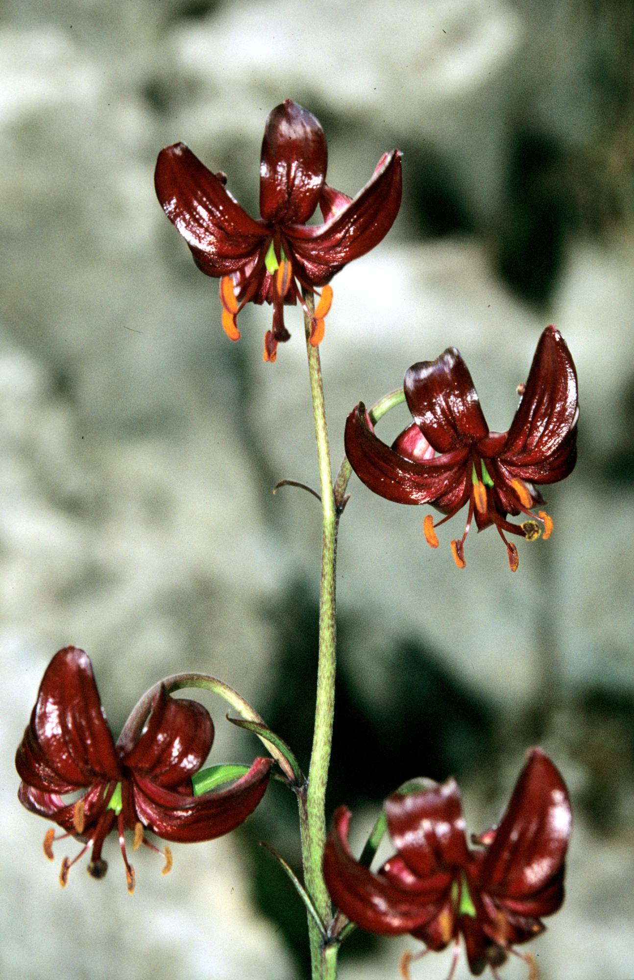 Lilium martagon var cattanie in habitat at Orjen